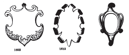 Bányászcsákány (en: mill-pick)